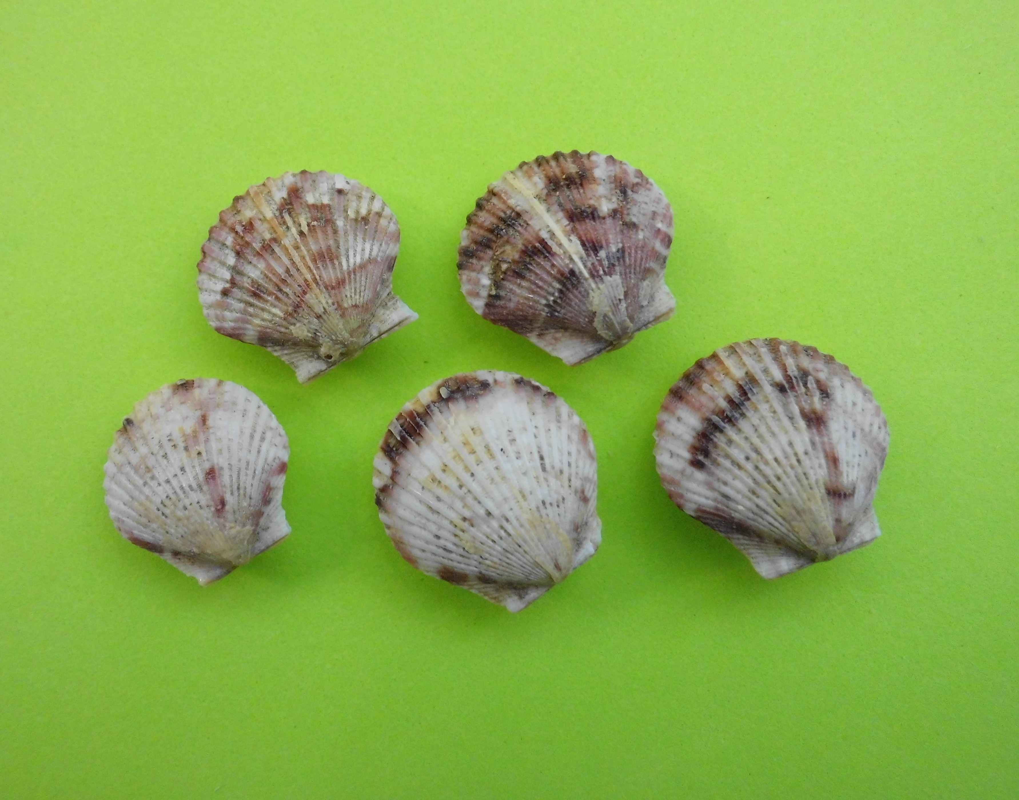 Argopecten gibbus (Linnaeus, 1758) colectados en 3003 3 km al Norte de Isla Zapara - Estado Zulia - Venezuela